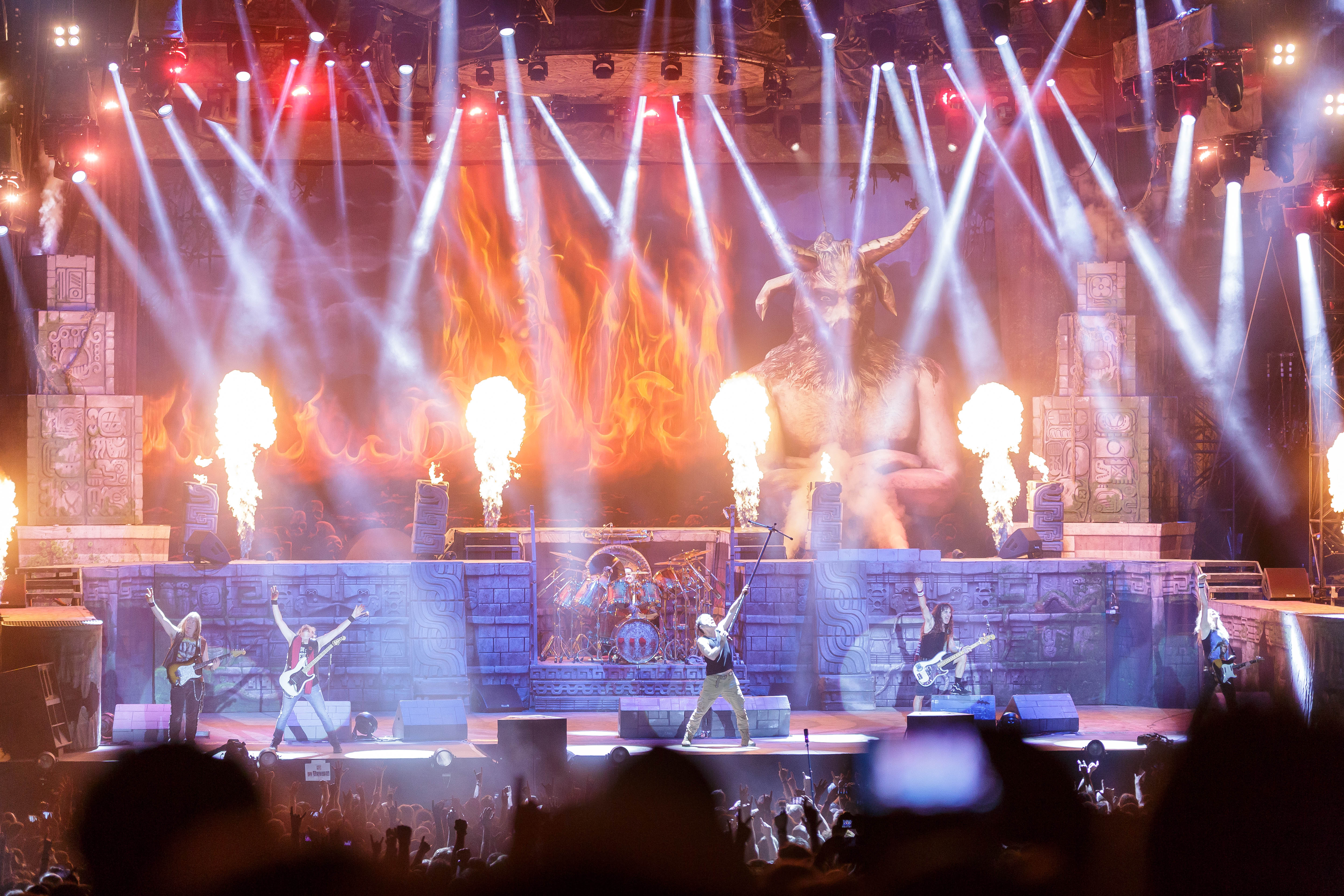 Paléo Festival Nyon, édition 2016, 19-24 juillet 2016. Mercredi 20: Iron Maiden (heavy-metal, Grande-Bretagne)